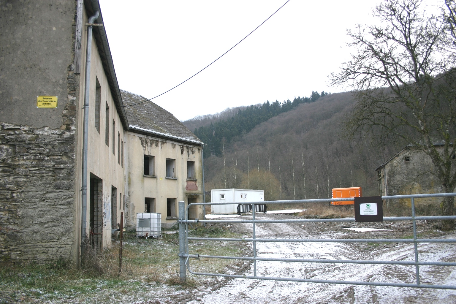 Kaalbermillen .